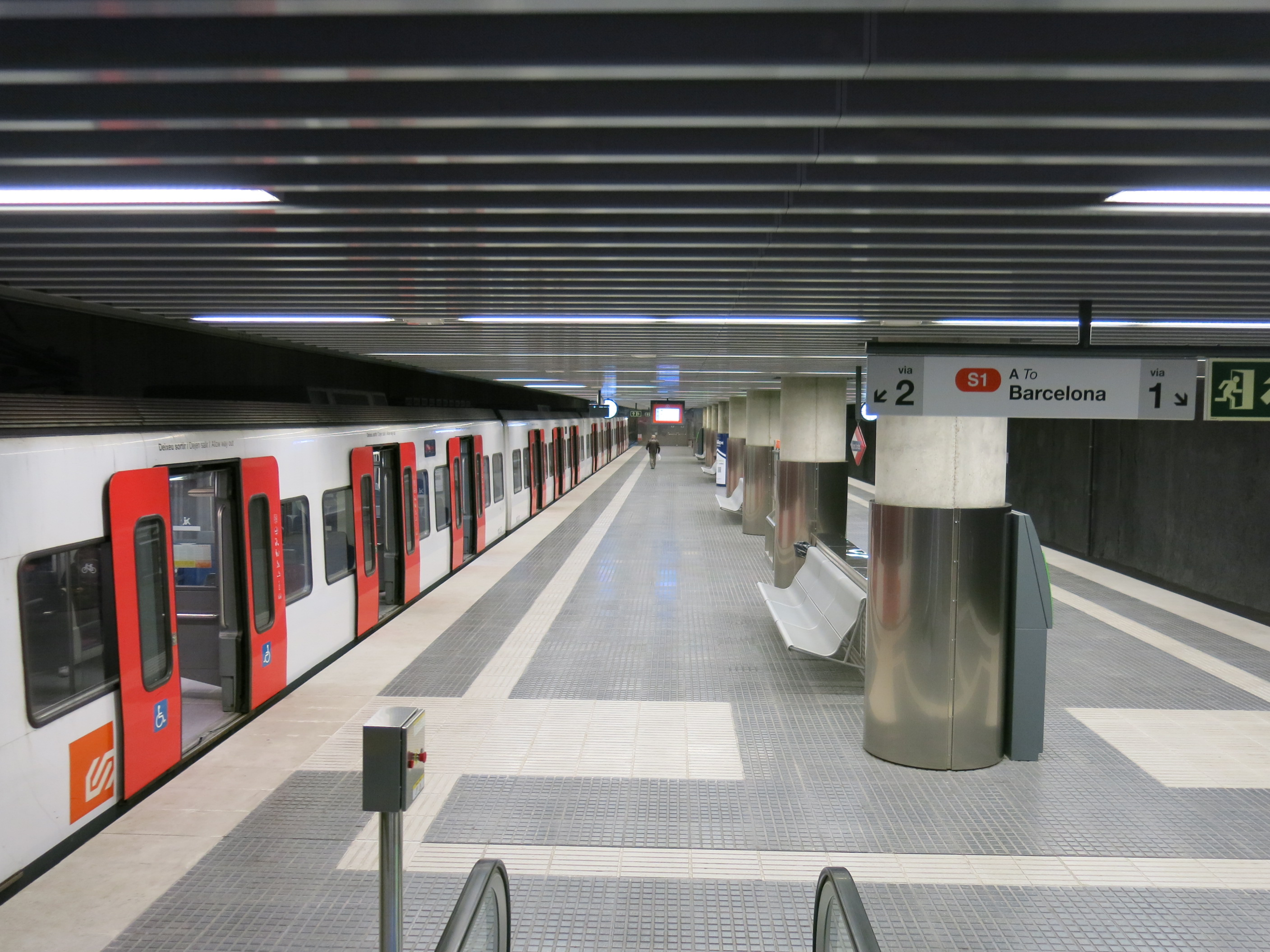 Estació Terrassa Nacions Unides, dels Ferrocarrils de la Generalitat de Catalunya